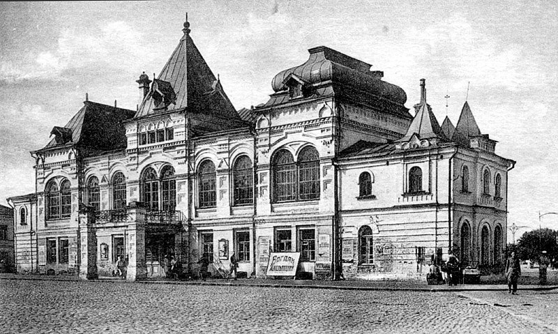 Городской зимний театр